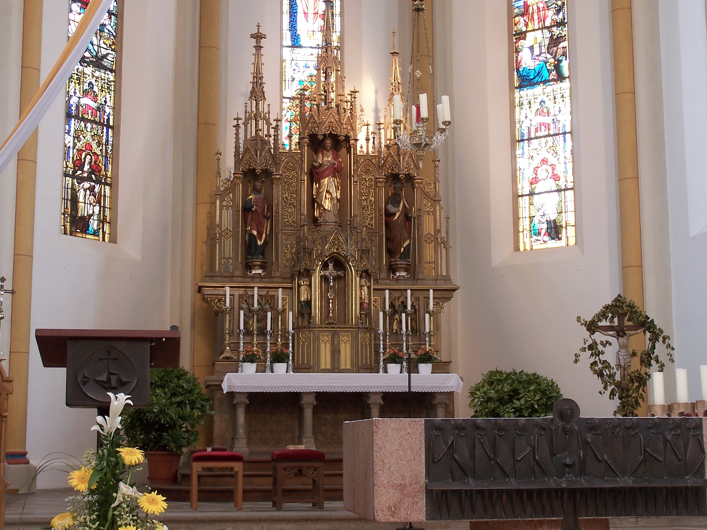 Pfeffenhausen, Kirchplatz 16. Katholische Pfarrkirche St. Martin. Neugotische Basilika, Blankziegelbau, nach Planung des königlichen Baumamtmanns Anton Völkl, 1885-87. Altarraum mit neugotischem Altar und farbigen Chorschlussfenstern.